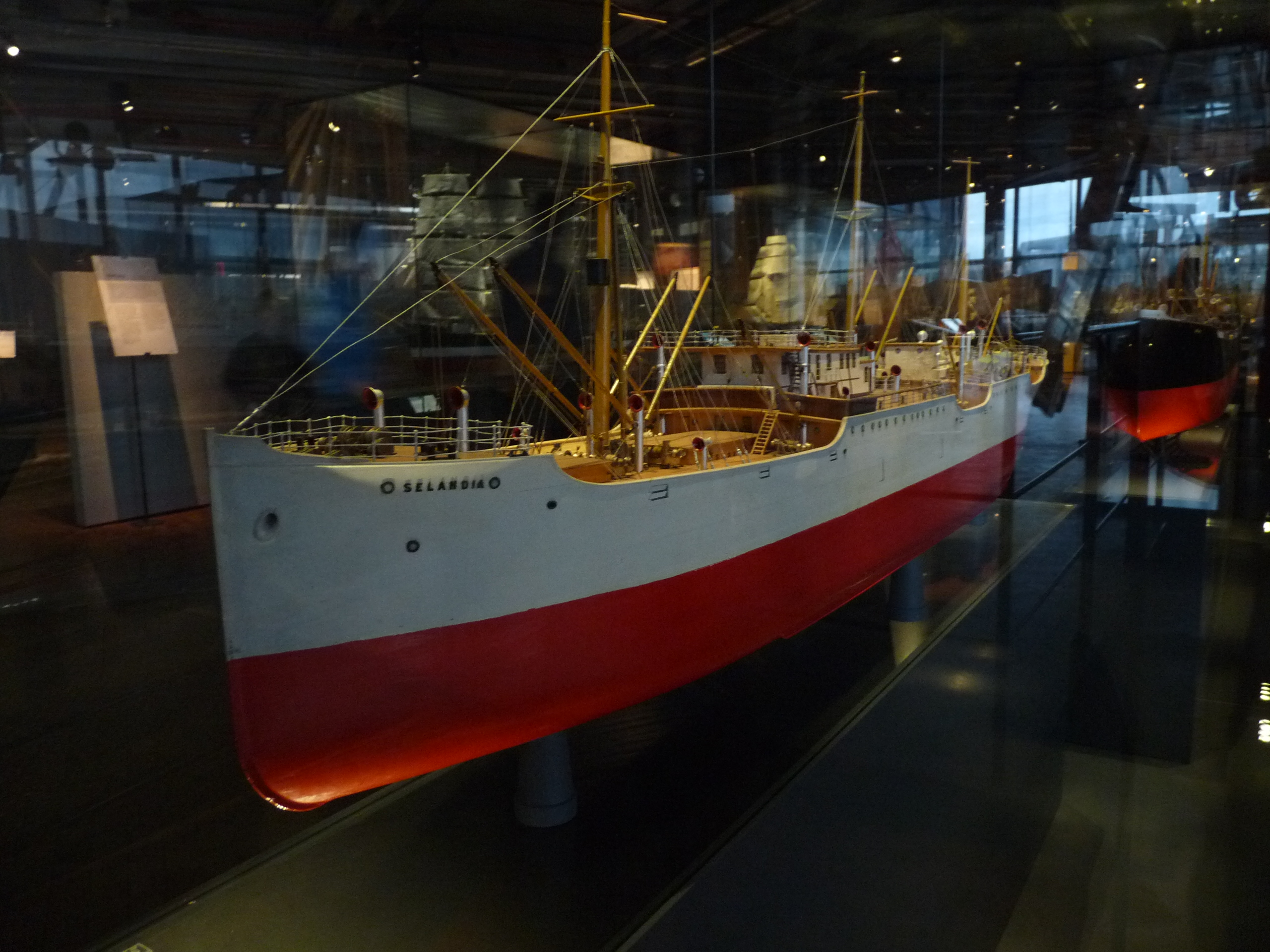 Die Selandia war das erste hochseefähige Schiff mit Dieselmotor sowie das erste Schiff mit elektrischen Ladewinden von Siemens-Schuckert. German Museum of Technology Native nameDeutsches Technikmuseum BerlinLocationBerlinCoordinates52° 29′ 55″ N, 13° 22′ 39″ E Established1983Web page control : Q706530 VIAF: 150642200 ISNI: 0000 0001 0121 6426 LCCN: n97103087 GND: 2162237-1 SUDOC: 075899728 WorldCat